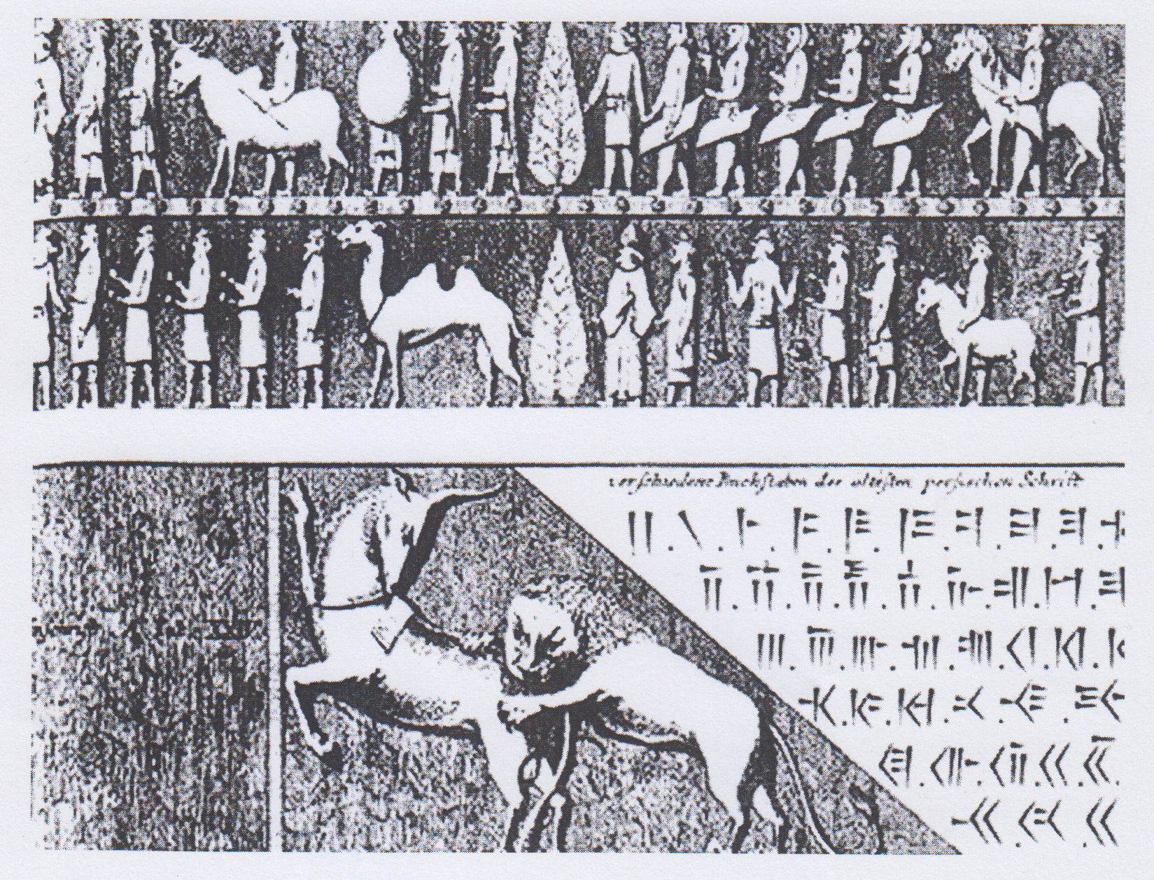 طراحی و کپی برداری کارستن نیپور از کتیبه‌های تخت جمشید (1733-1815 م.)